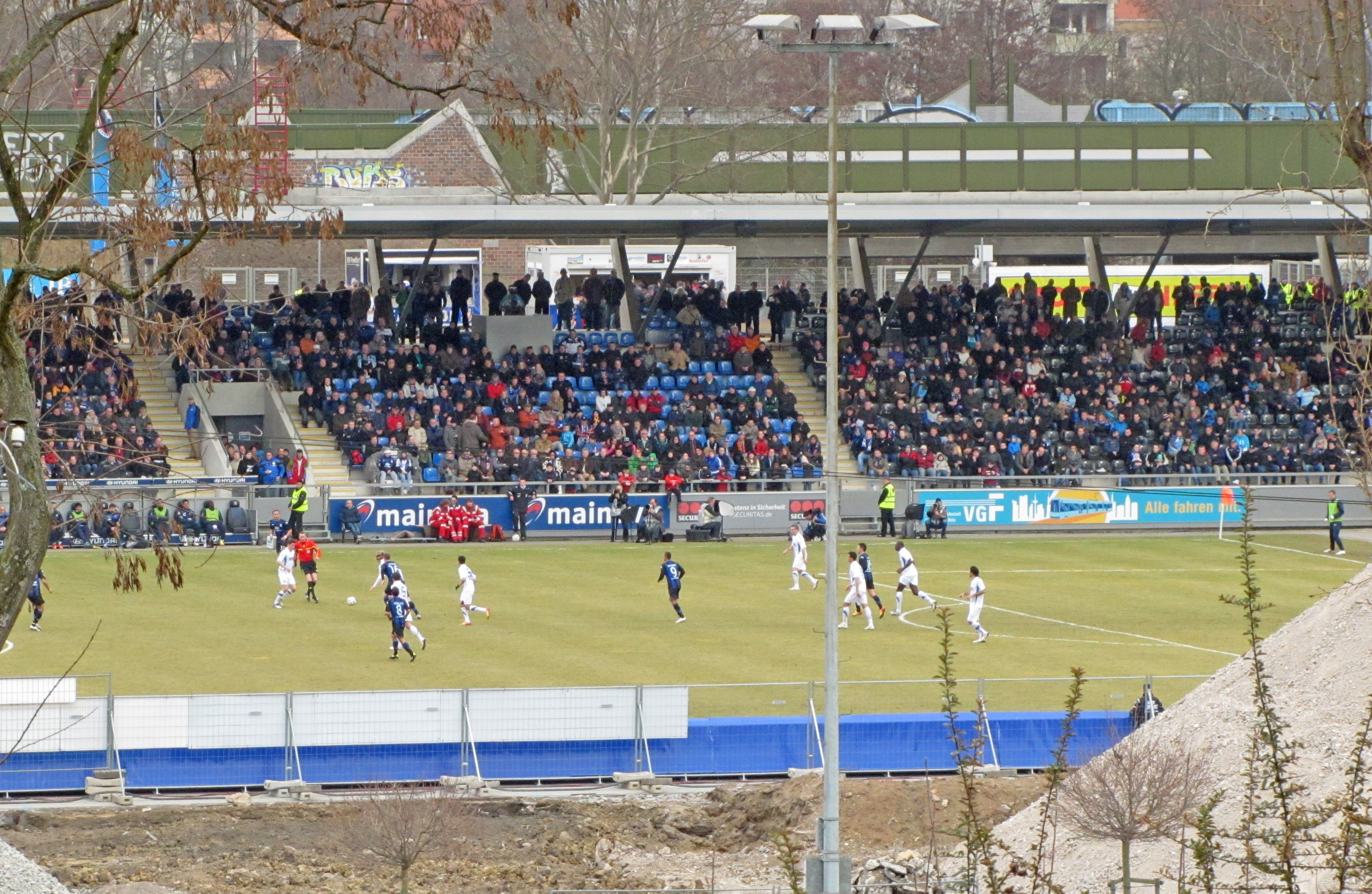 2. BL-Spiel, FSV gegen KSC, 26.02.2012. Im Frankfurter Volksbank Stadion (nach Abriss der alten Haupttribüne.